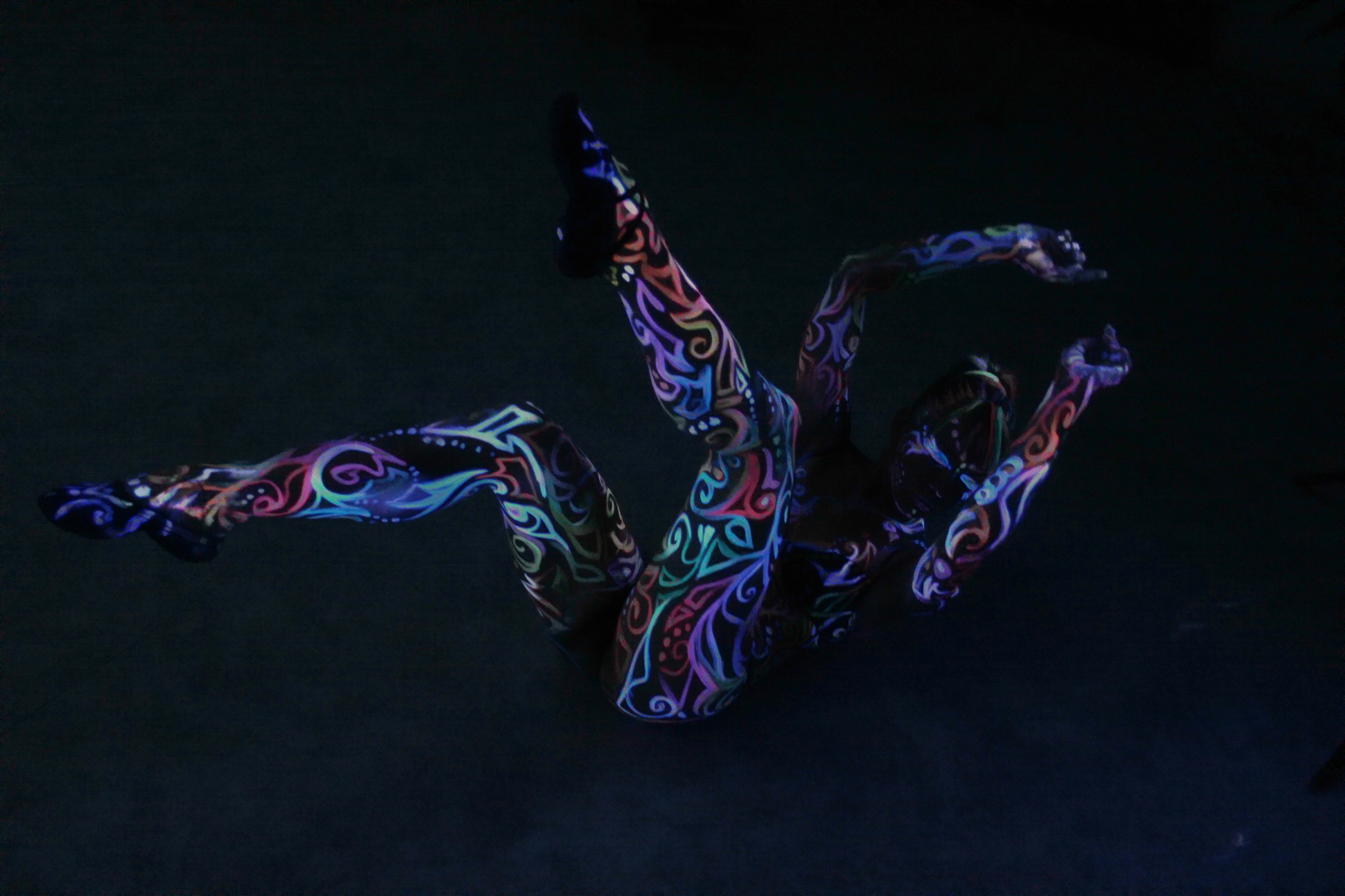 Bodypainting unter Schwarzlicht. Die Tänzerin Uliana Selezkaja bei der Aufführung eines Tanzes anlässlich der Kulturtage in München 2012. Idee und Ausführung des Bodypainting Lucia Jantos.